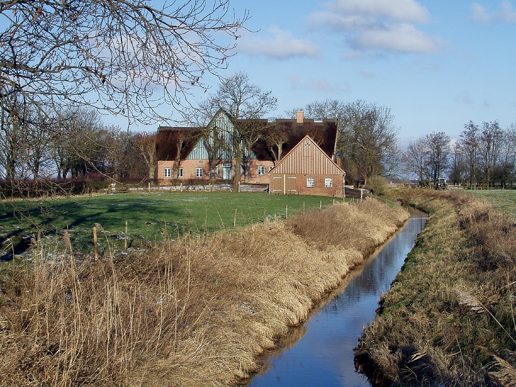 Neuendeich, Schleswig-Holstein Germany